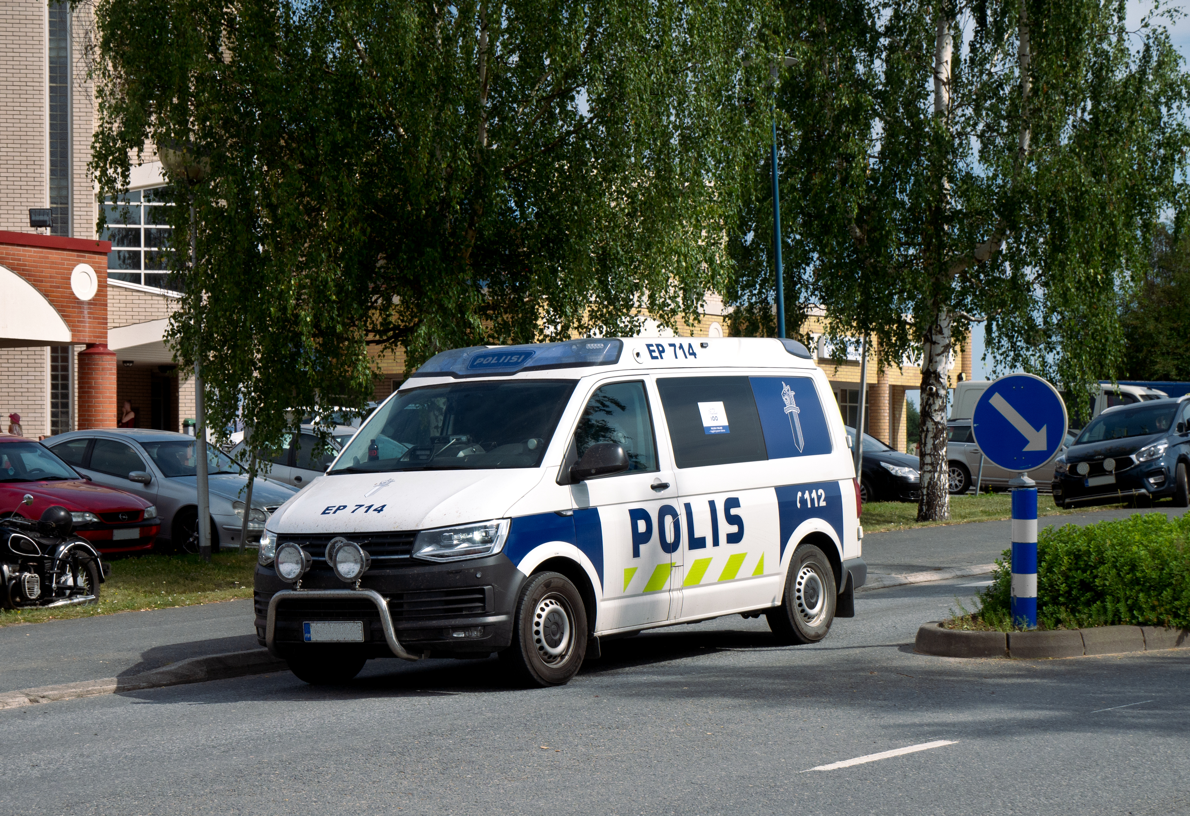 Suomen poliisin mustamaija Lappajärvellä.